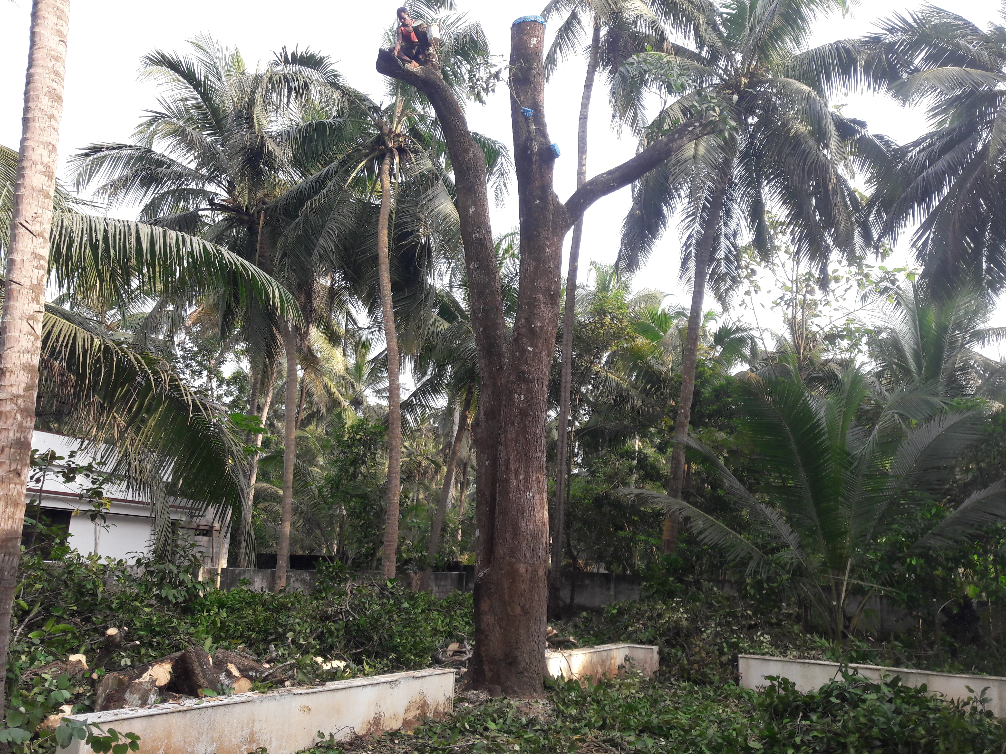 മരങ്ങളിലെ പുനർ യൗവന പ്രക്രിയ നടത്തുന്ന ഒരു മാവ്.